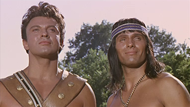 Scena del film Ercole contro i figli del sole